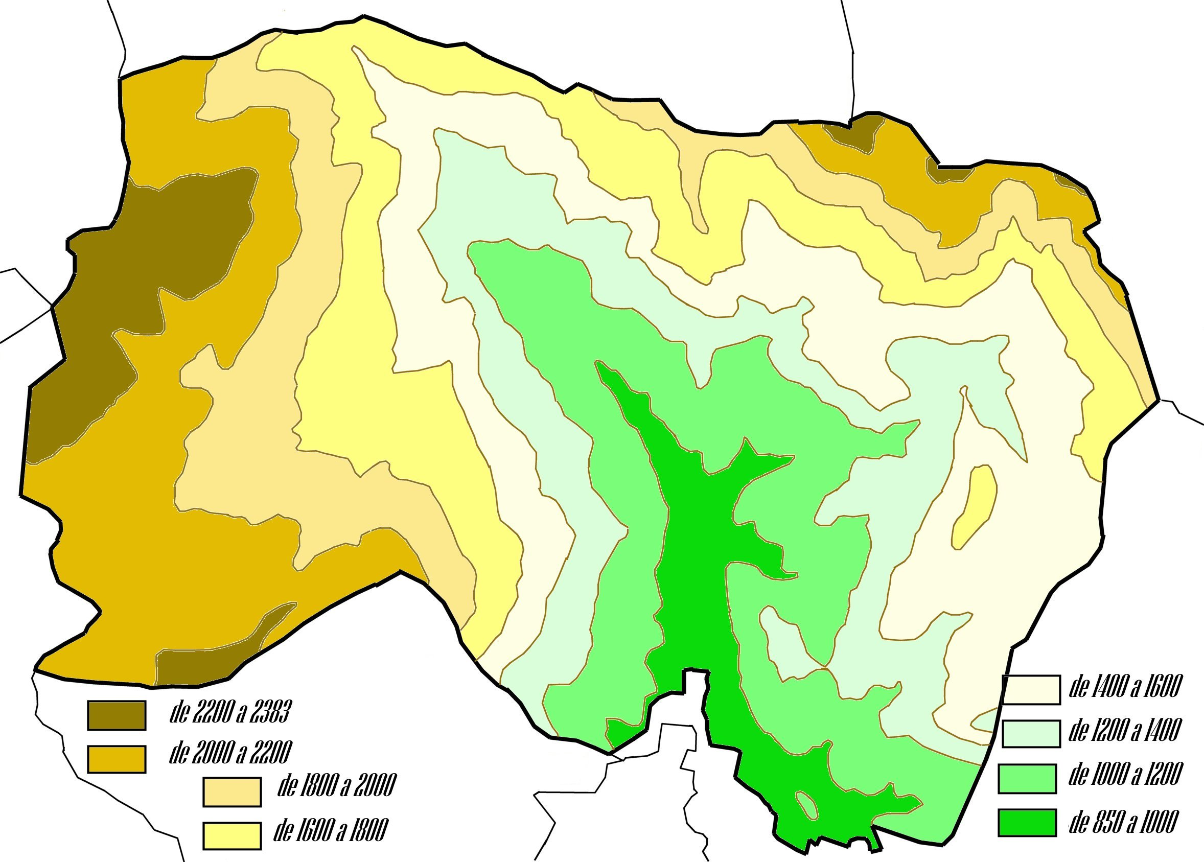 Mapa orogràfic del municipi de la Coma i la Pedra (Solsonès)